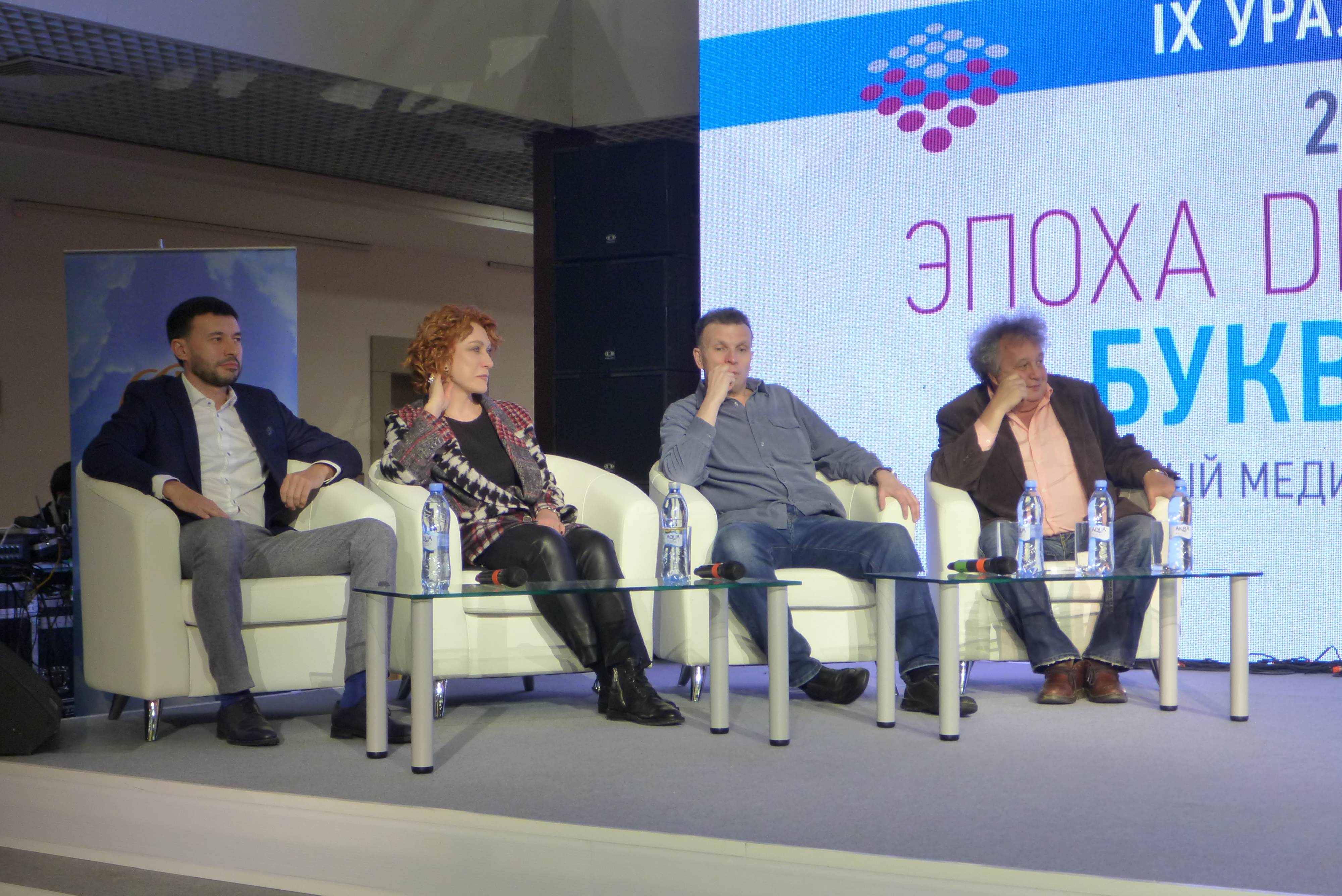 Участники пленарного заседания на Девятом Уральском медиафоруме 23 ноября 2018 года. Справа налево - Евгений Горенбург, Иннокентий Шеремет и Татьяна Самойлова